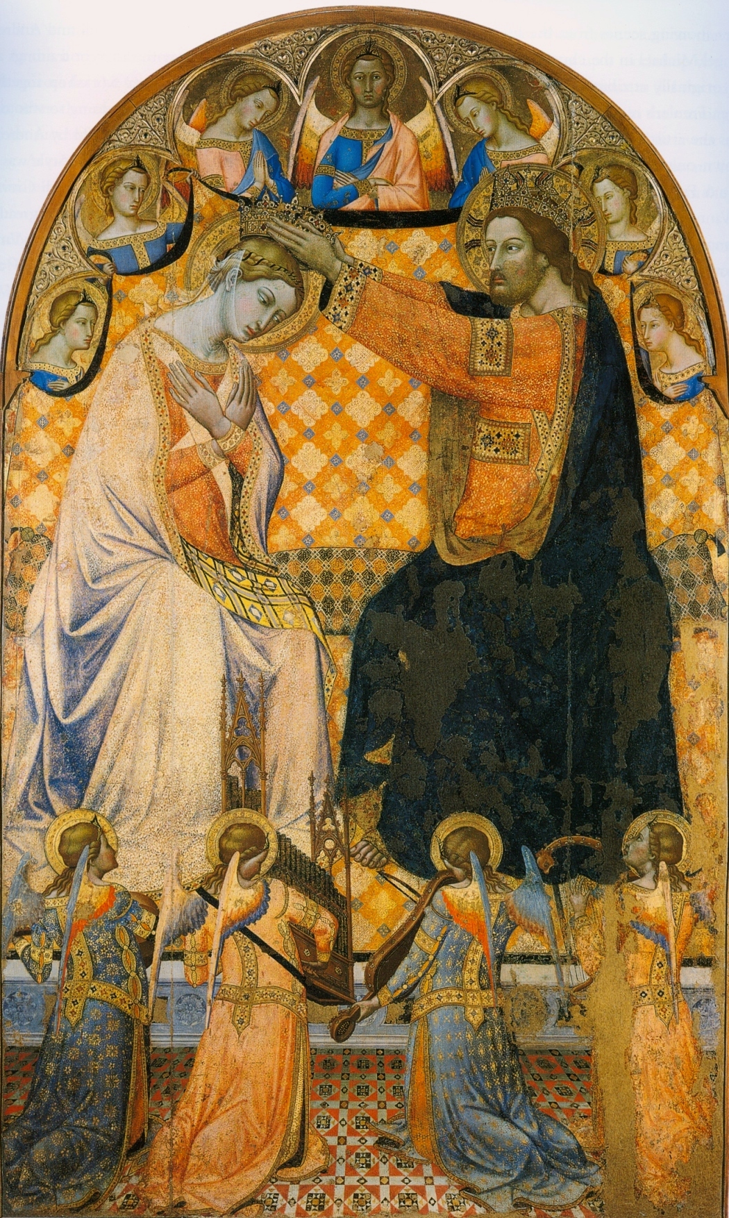 Coronation_of_Virgin_Jacopo_di_mino_Montepulciano